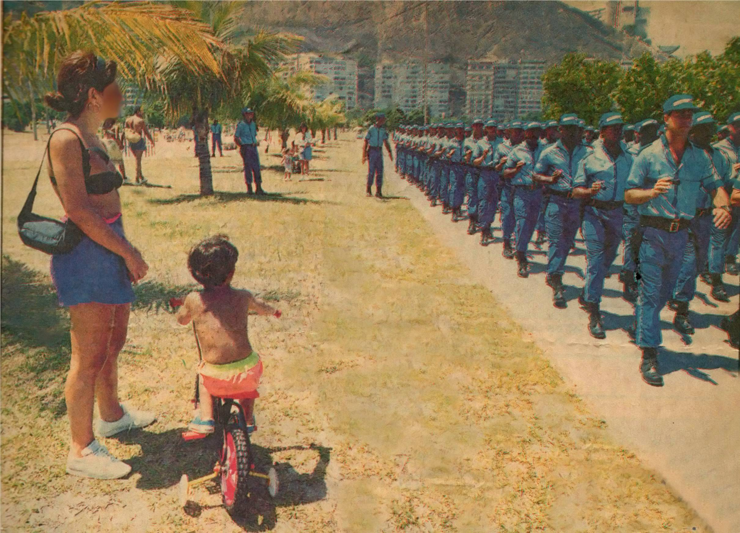 Foto da Guarda Municipal do Rio de Janeiro - 1992